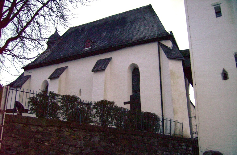 Stadtkapelle St. Georg (Arnsberg)